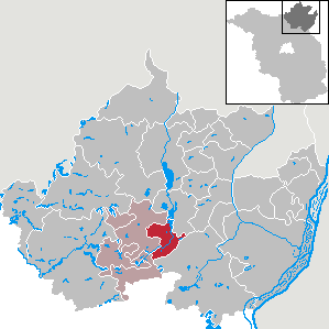 Flieth-Stegelitz in Brandenburg (Country) - District Uckermark